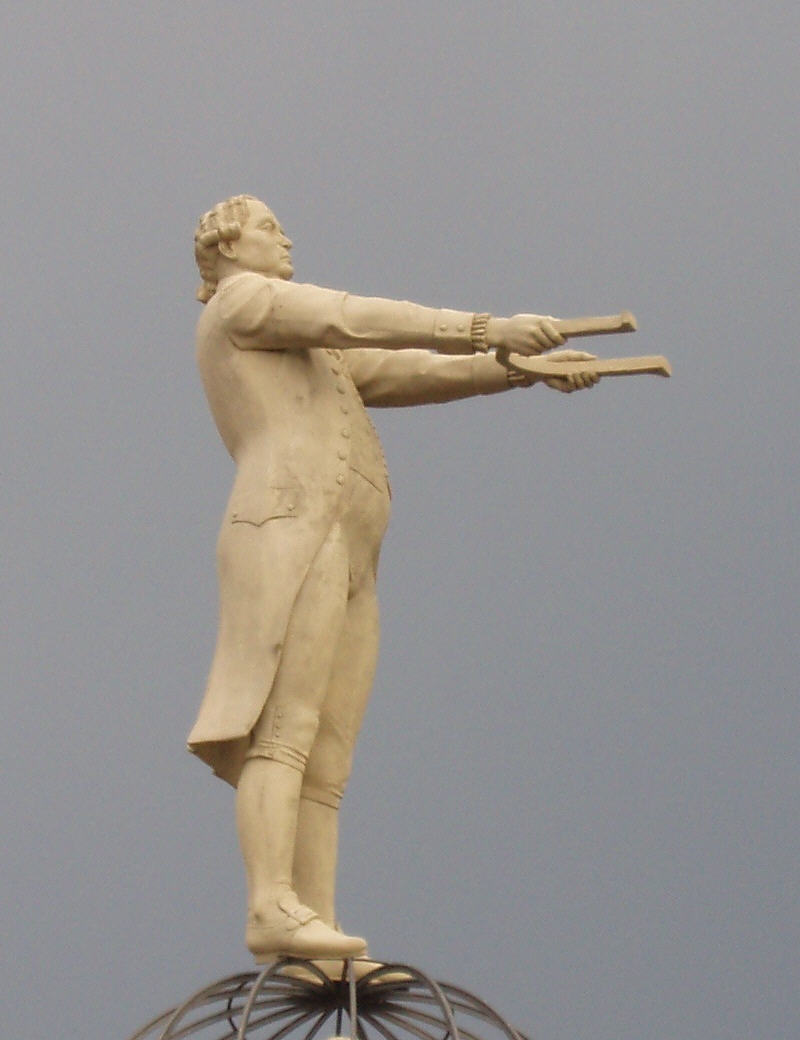 Detail der Magischen Säule von Peter Lenk in Meersburg